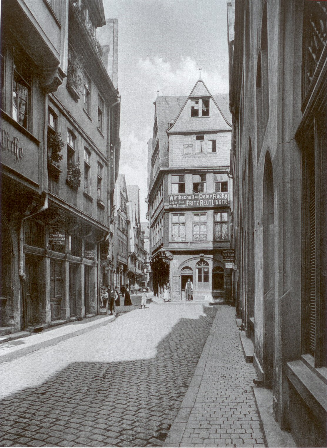 Frankfurt am Main, Germany. Die Saalgasse vom Fahrtor aus gesehen, um 1900